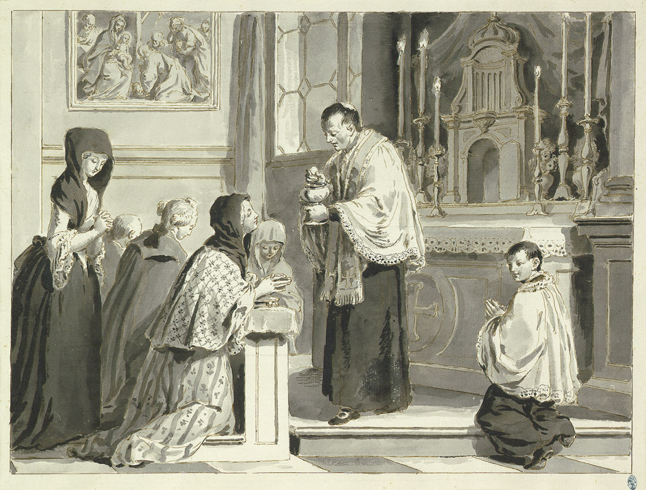 Eucharistie, aus einer Serie der sieben Sakramente: Federzeichnung, ca. 38,5 x 52,5 cm; hergestellt im Auftrag von Padre Ghedini